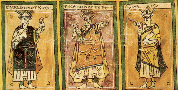 Reyes visigodos: Chindasvinto, Recesvinto y Égica. Según Códice Albeldense o Vigilano detalle del folio 428 del mismo.